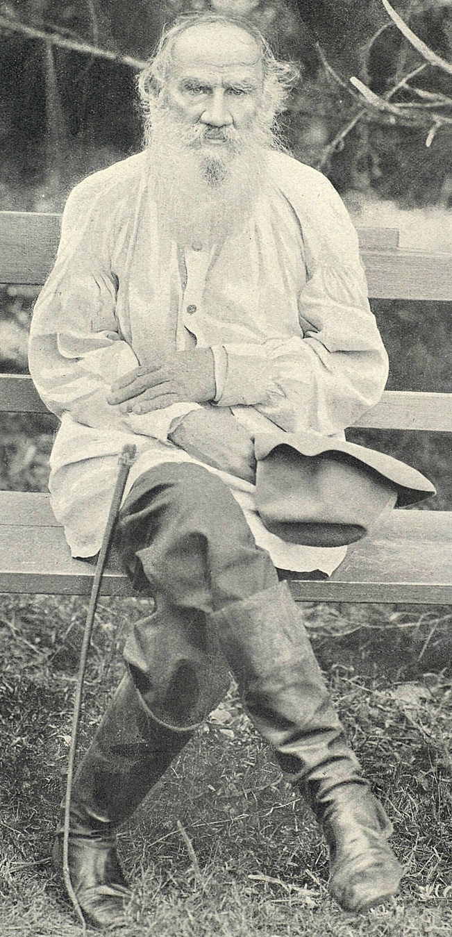 Лев Толстой